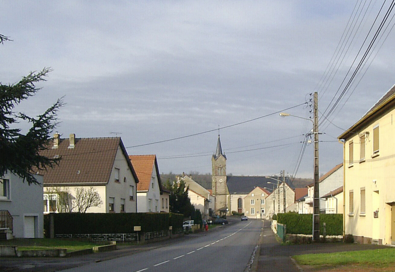 Rue de la Libération et l'église Saint-Gengoulf à Cappel